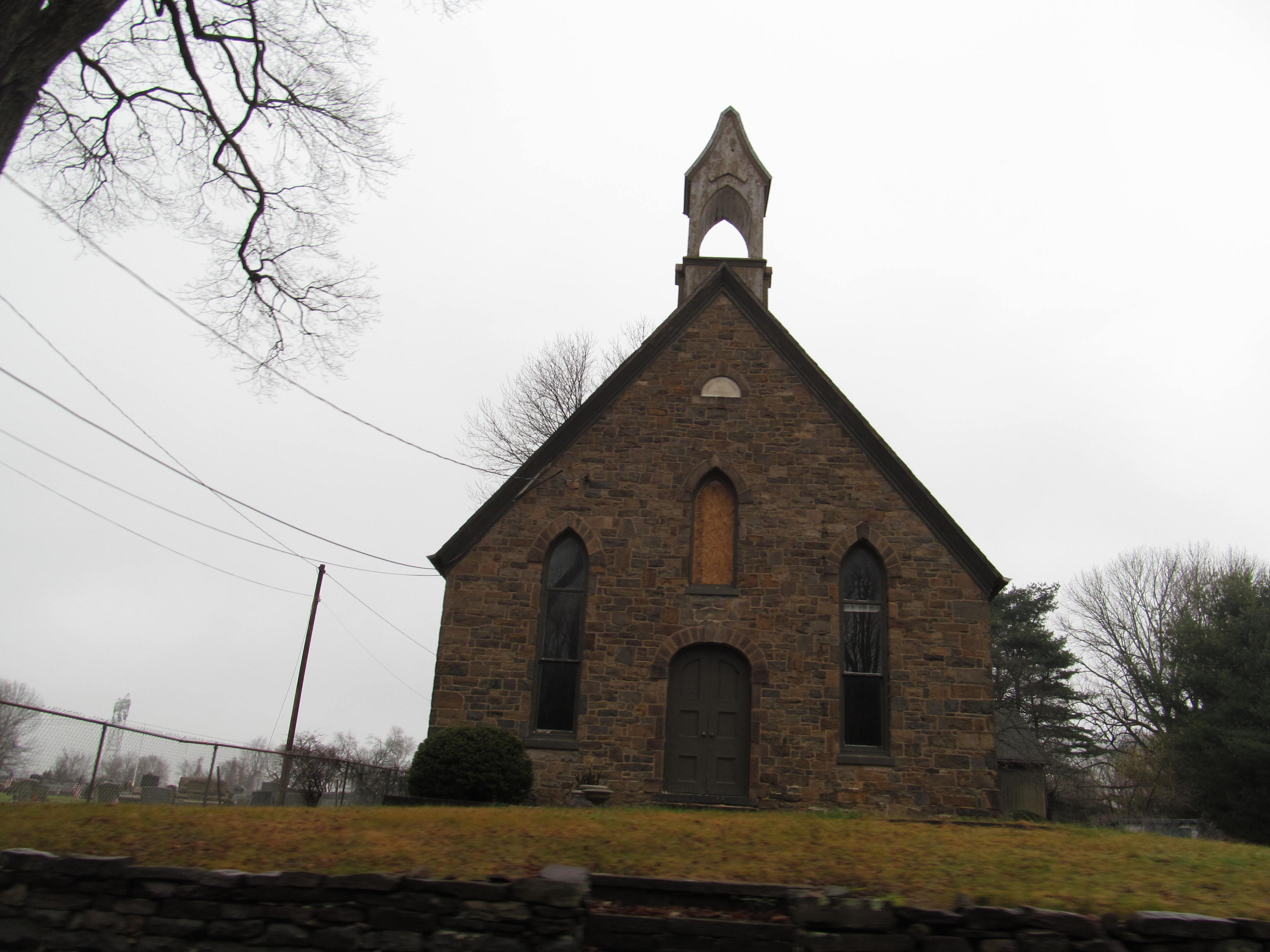 Carversville, Pennsylvania